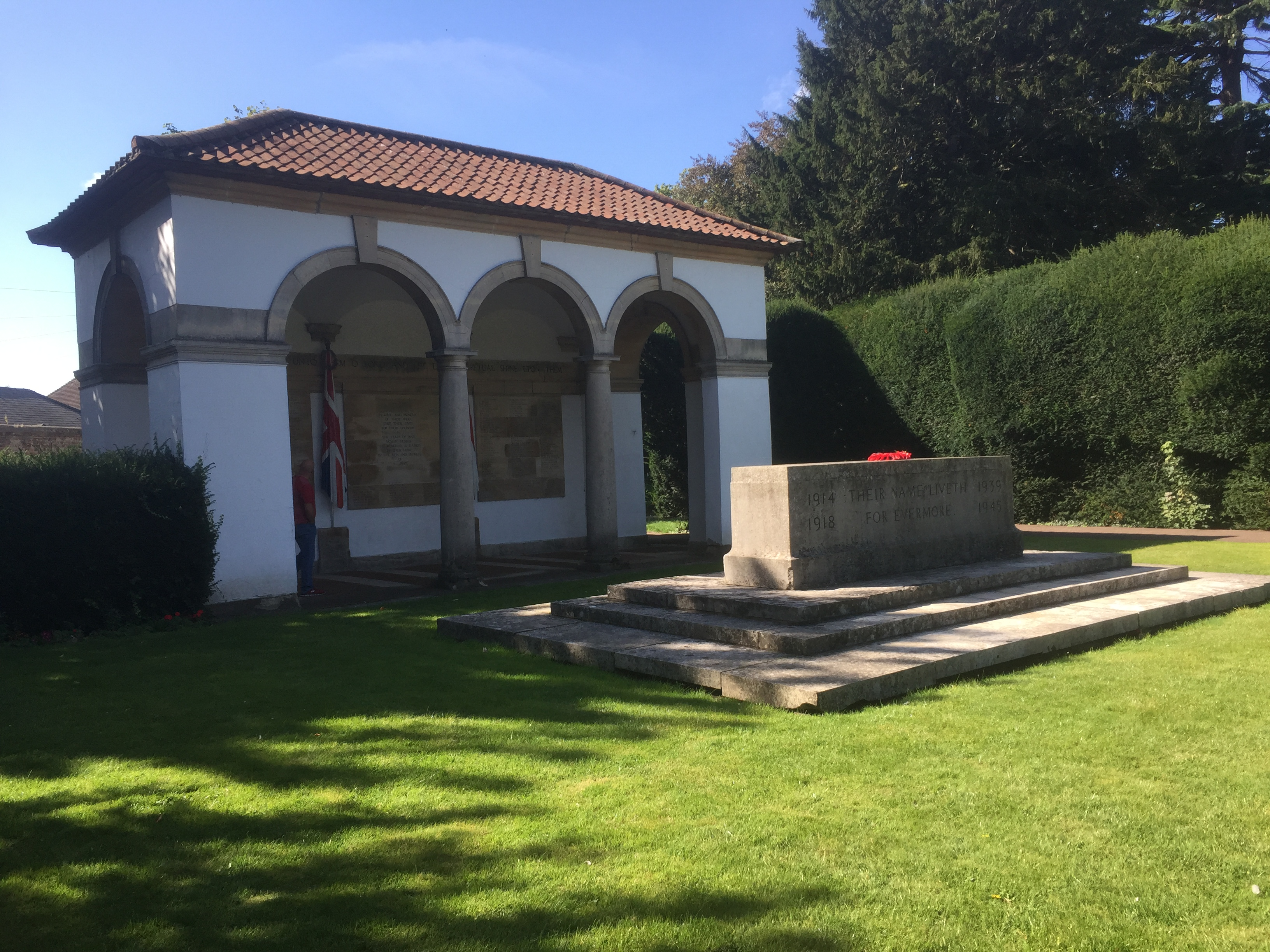 Spoldingo muziejus